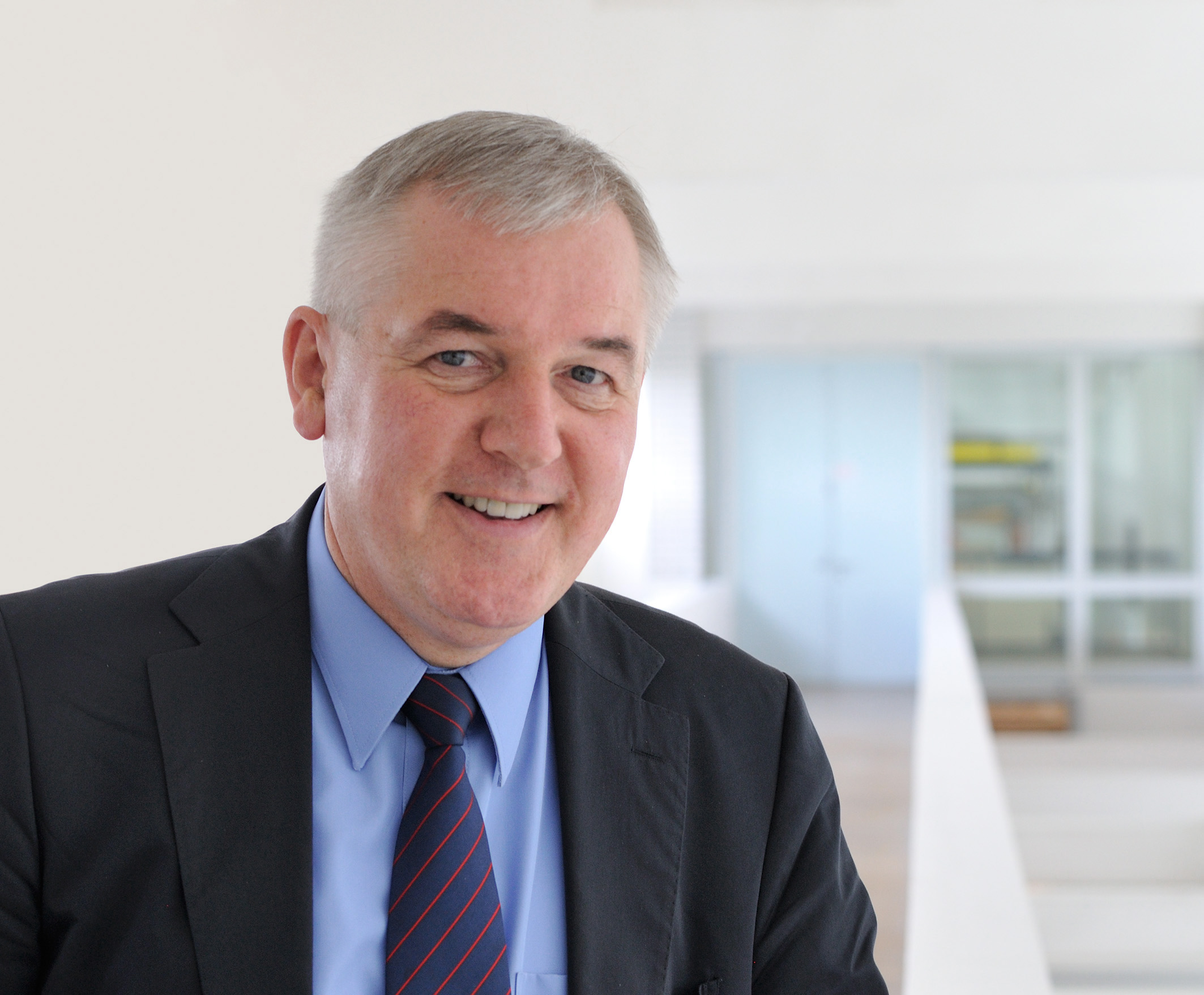 Prof. Dr. Hartwig Lüdtke